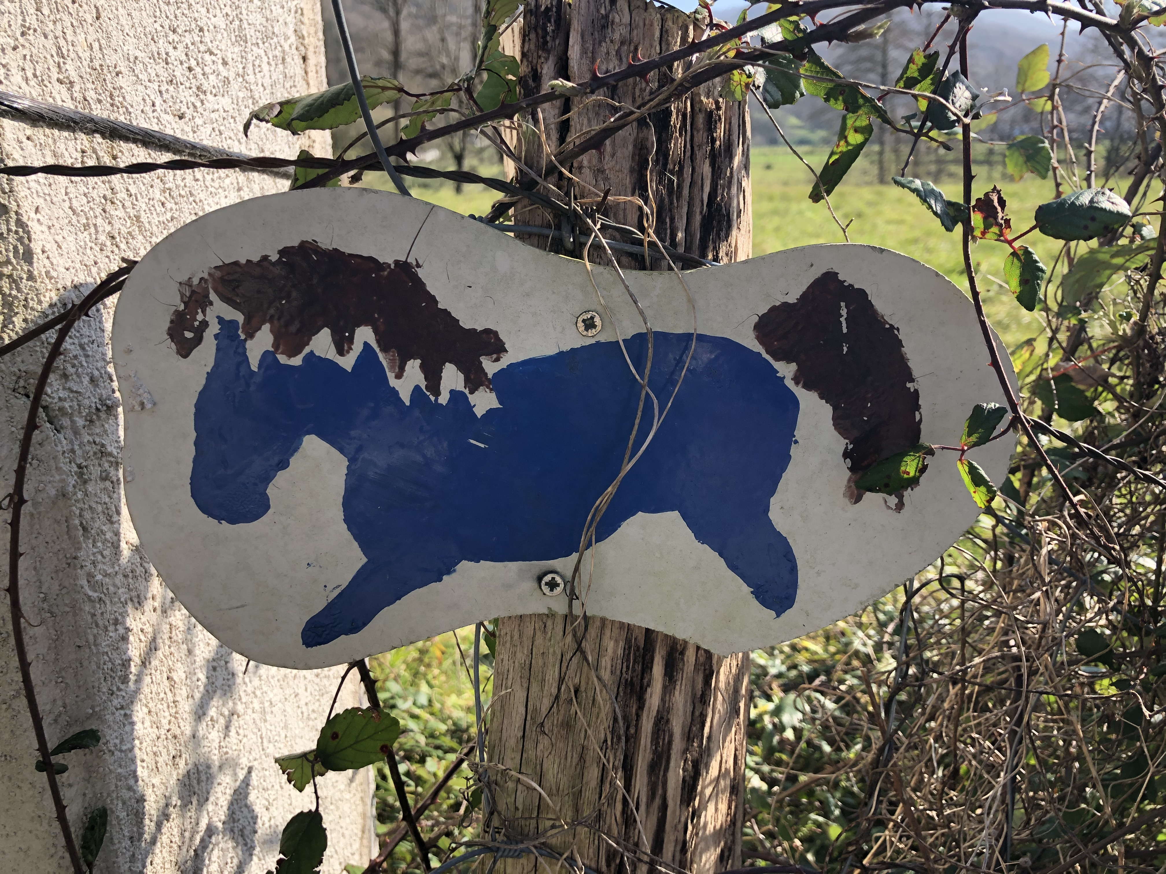 Pottoka Urdinaren ibilbidea jarraitu ahal izateko, irudi honi erreparatu behar zaio, honek osatuko baitu ibilbide osoa.